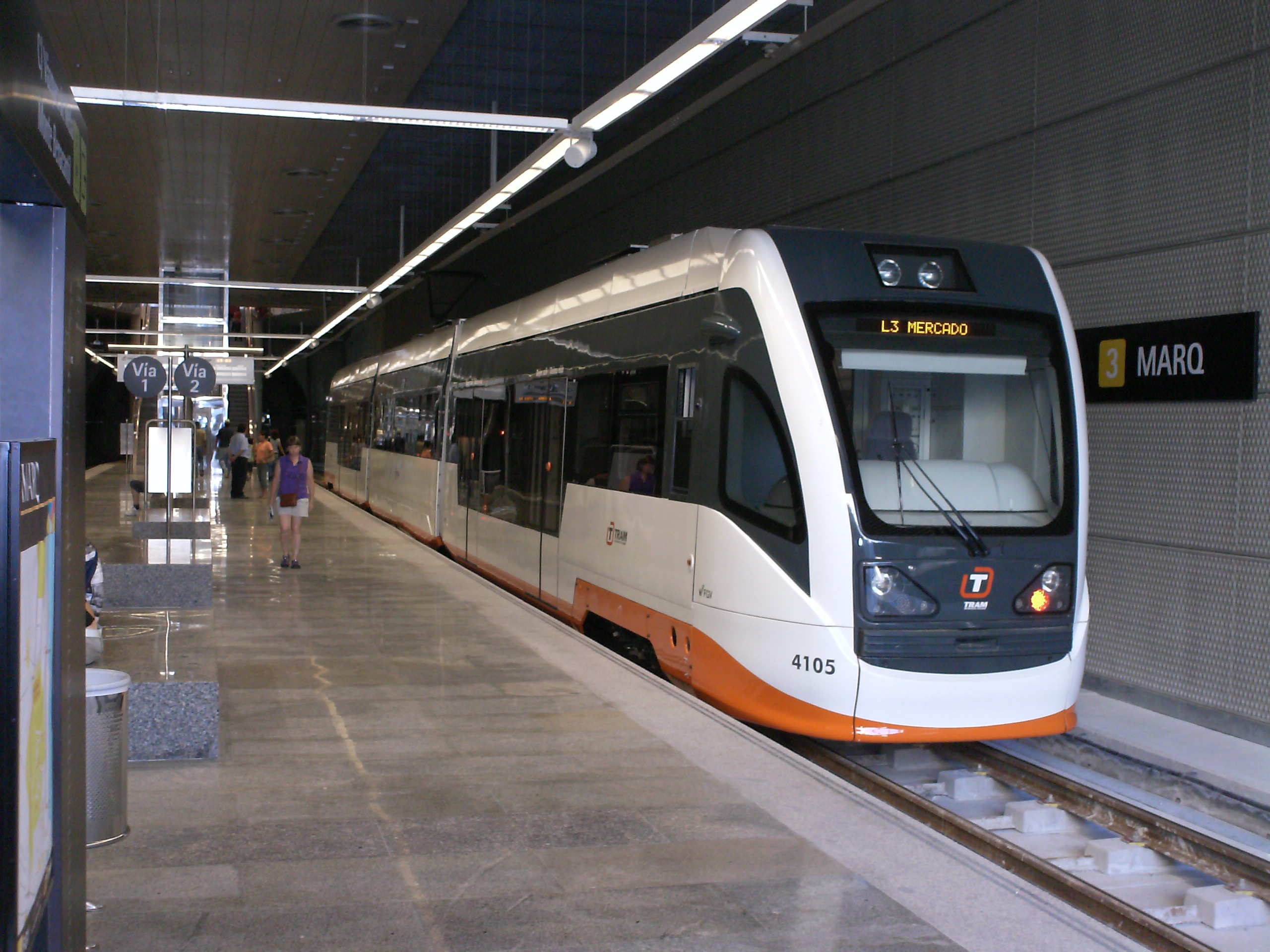 Bahnsteigebene der Station MARQ der Stadtbahn Alicante / La estación MARQ del TRAM Metropolità d'Alacant